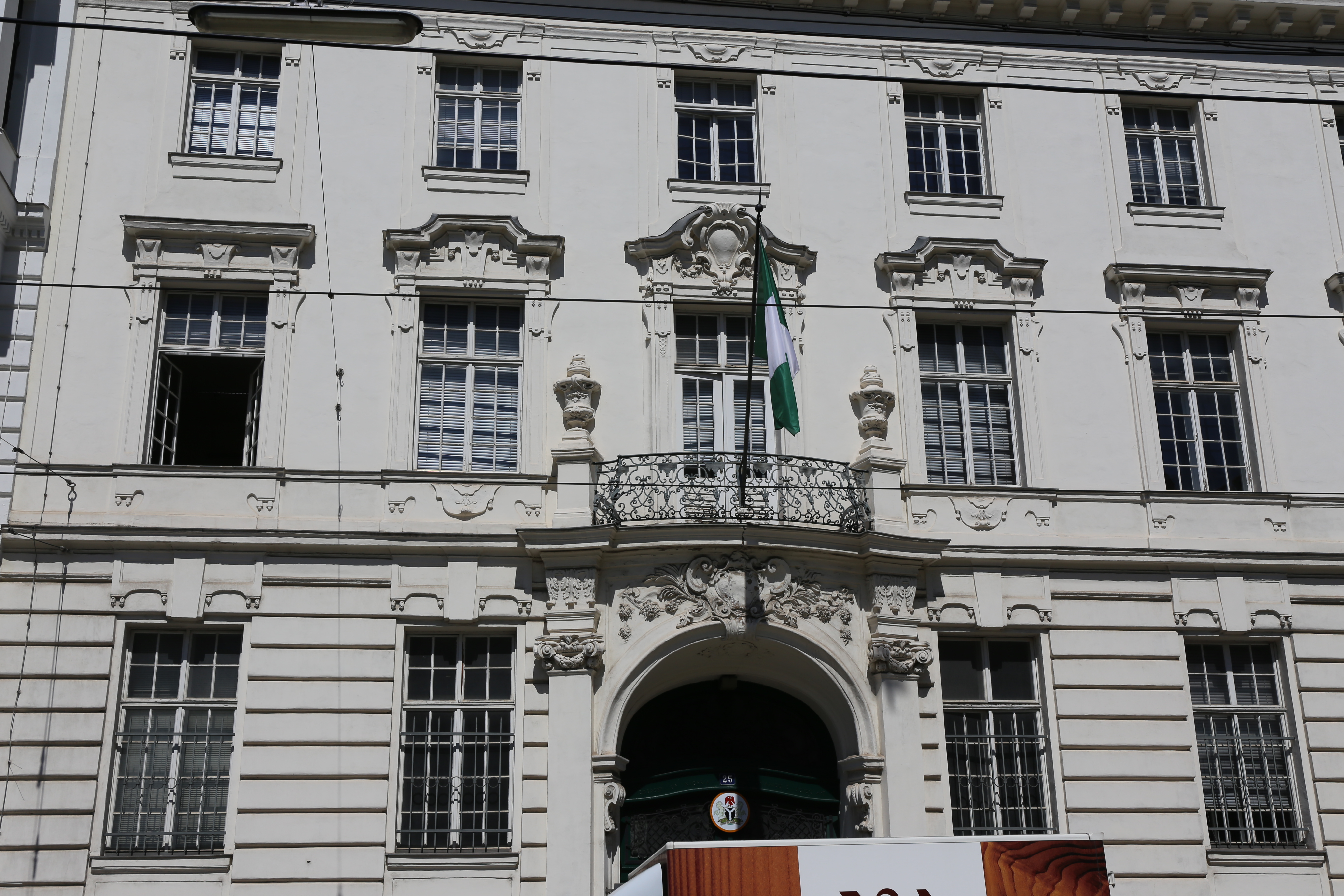 Ambassade du Nigeria à Vienne.